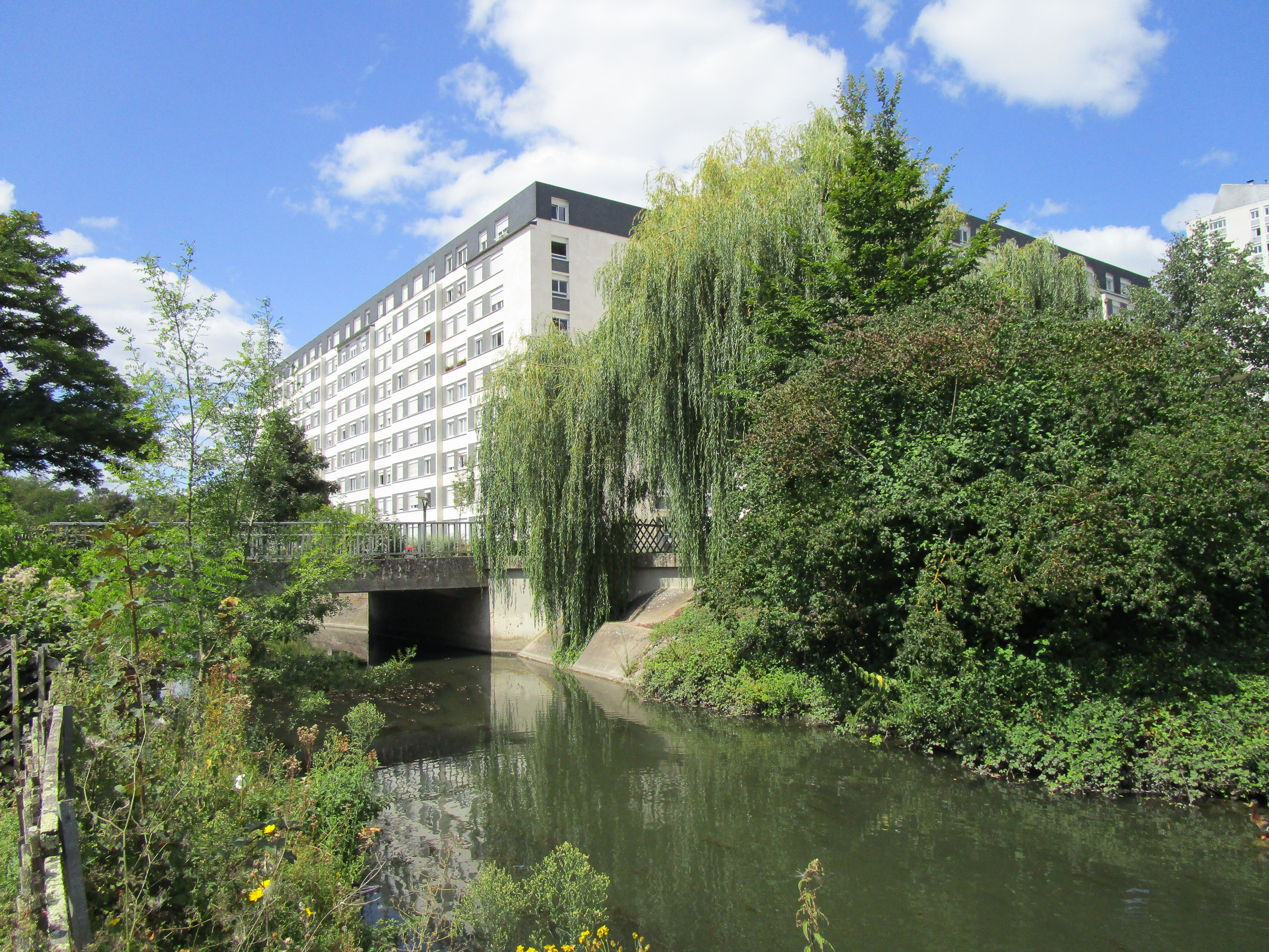 Vue du petit Cher dans le quartier des Fontaines à Tours et du pont sur la rue Jules Massennet